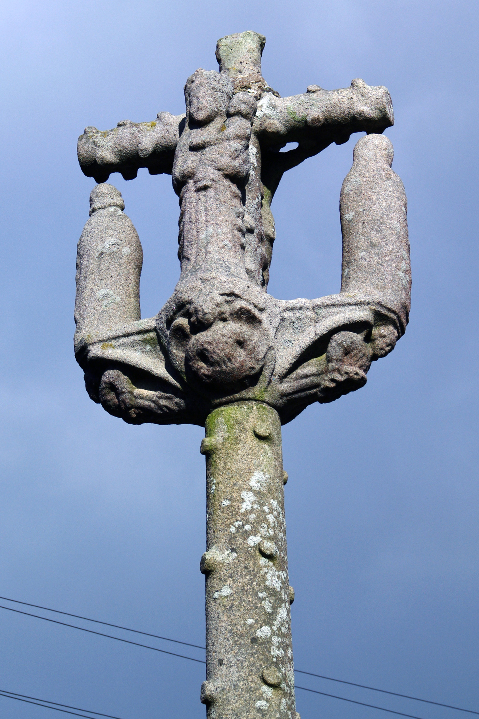 Croix du XVIIIe siècle, la Croix de Pierre (Inscription, 1927) .